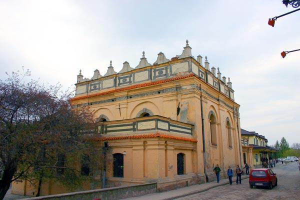 Zamosc (Poland)